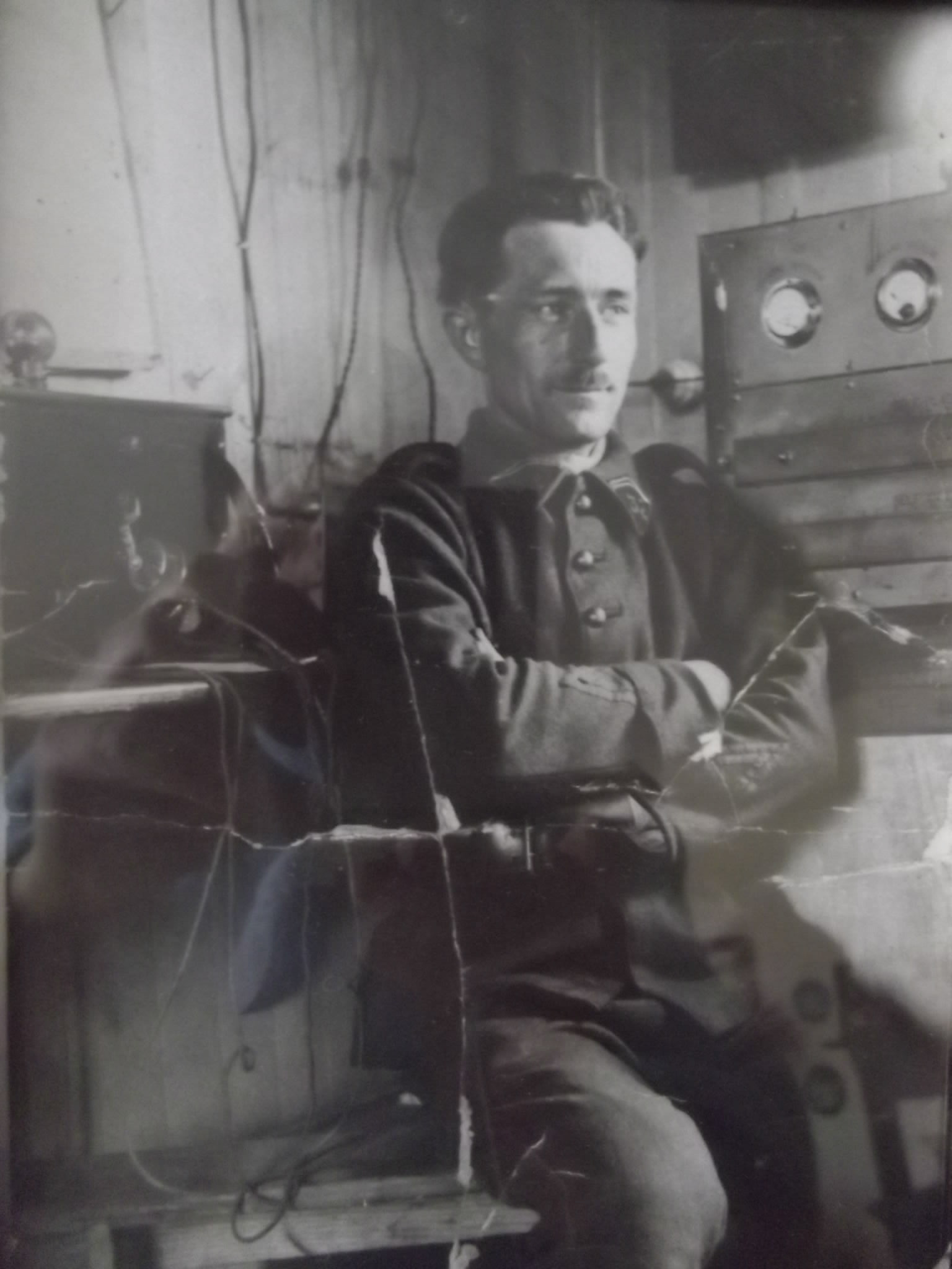 Léopold Aubry radio-navigant de l'aéropostale,1929